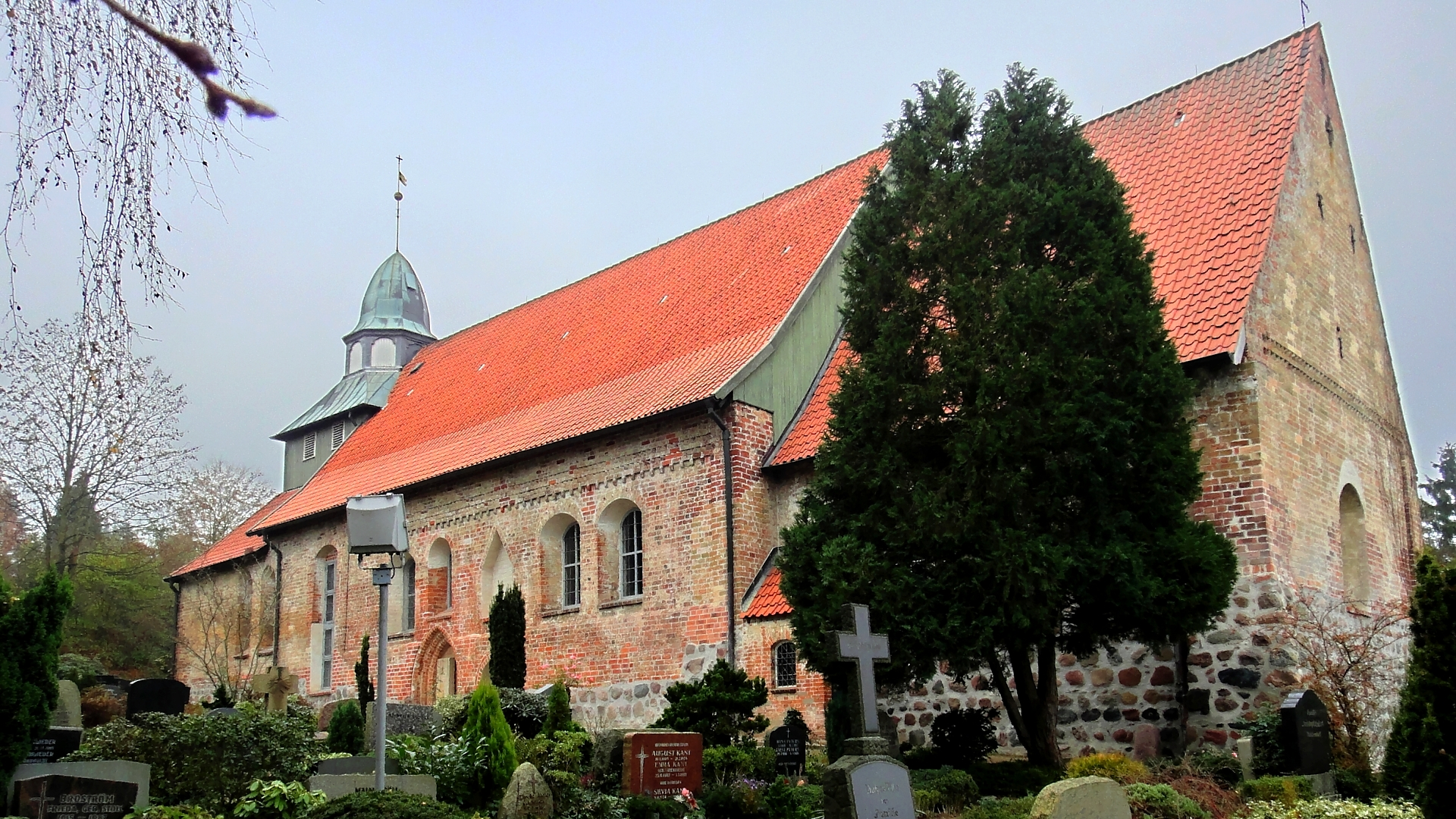 Romanische Kirche St. Georg auf dem Berge in Ratzeburg